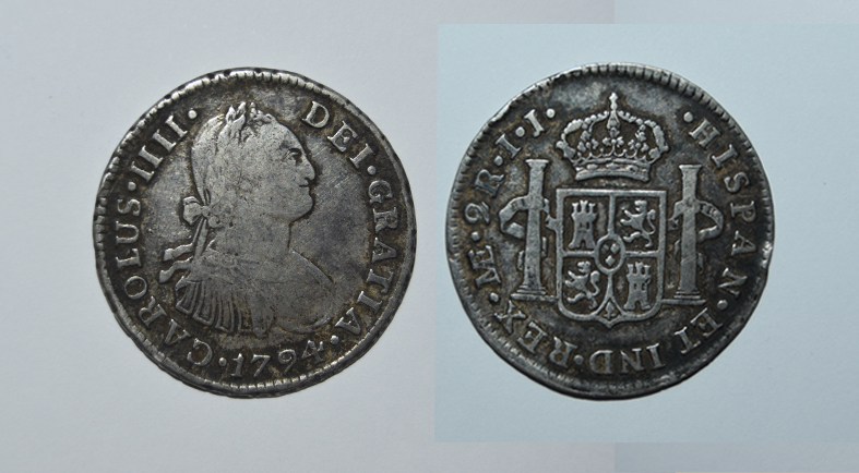 Colección privada PJA